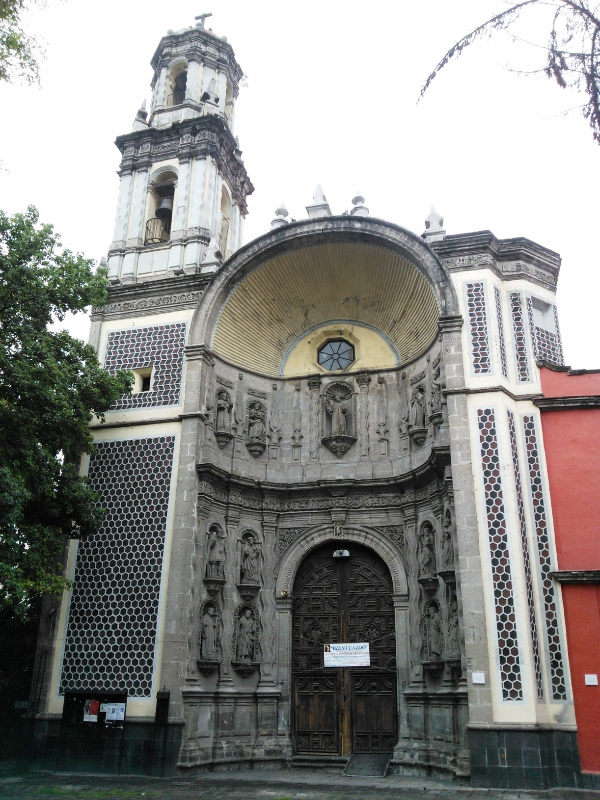 Templo de San Juan de Dios en la Ciudad de México